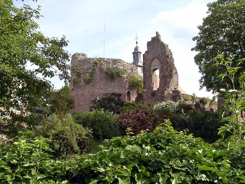 Burg Hayn in Dreieich, Hesse, Germany